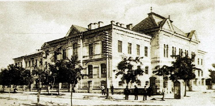 Кишинёвская духовная семинария (ул. Гоголя и ул. Киевская)